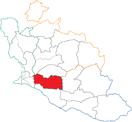 Situation du canton dans le département de Vaucluse (France)